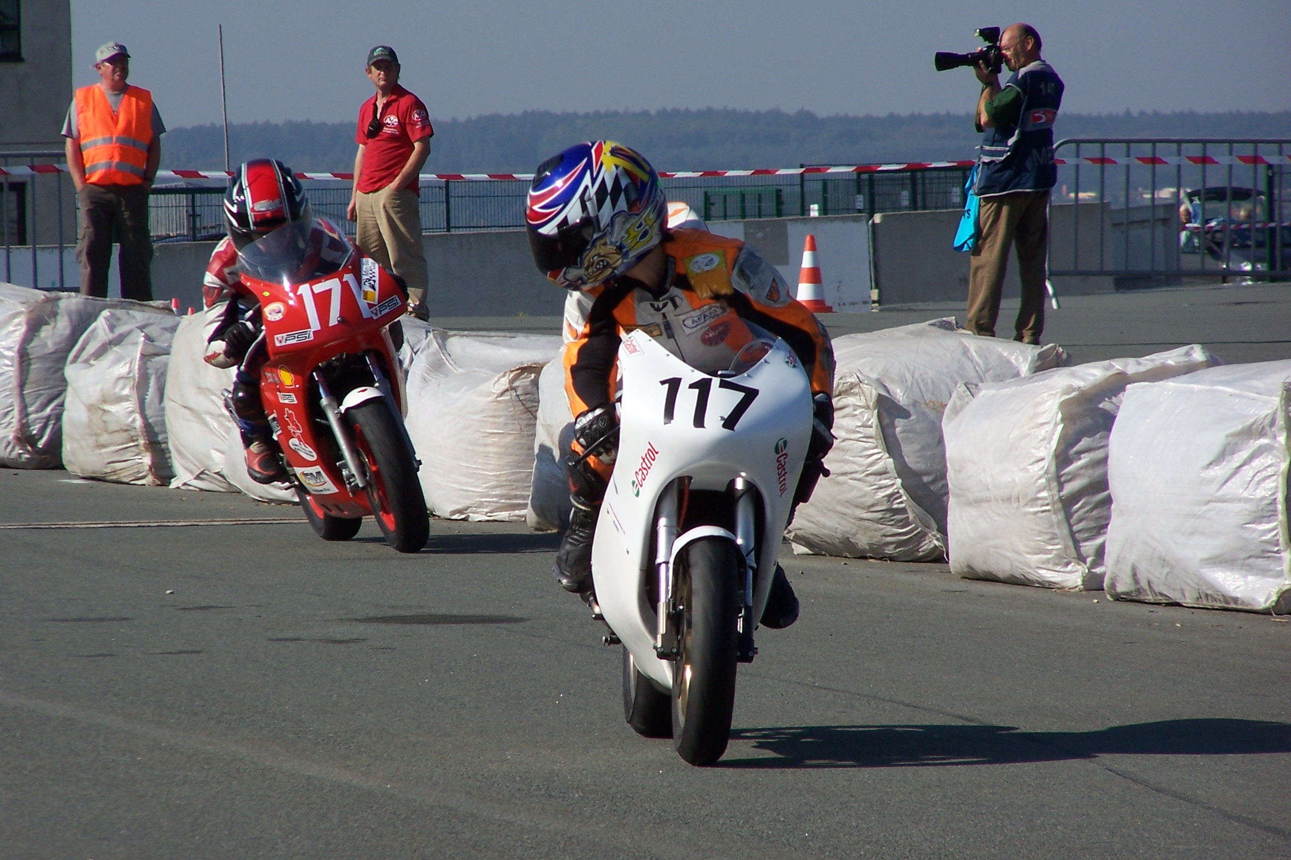 Oldrich Hanak beim 12 ADAC Mini Bike-Rennen auf dem Sachsenring im Rahmen des ADAC-Mini-Bike-Cups 2007